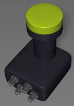 Konwerter quad z wyjściami na cztery odbiorniki satelitarne. W jednej obudowie umieszczono układ elektroniczny umożliwiający przesył sygnału dla czterech odbiorników.W uproszczeniu są to cztery konwertery Full Band w jednej obudowie działające niezależnie od siebie.